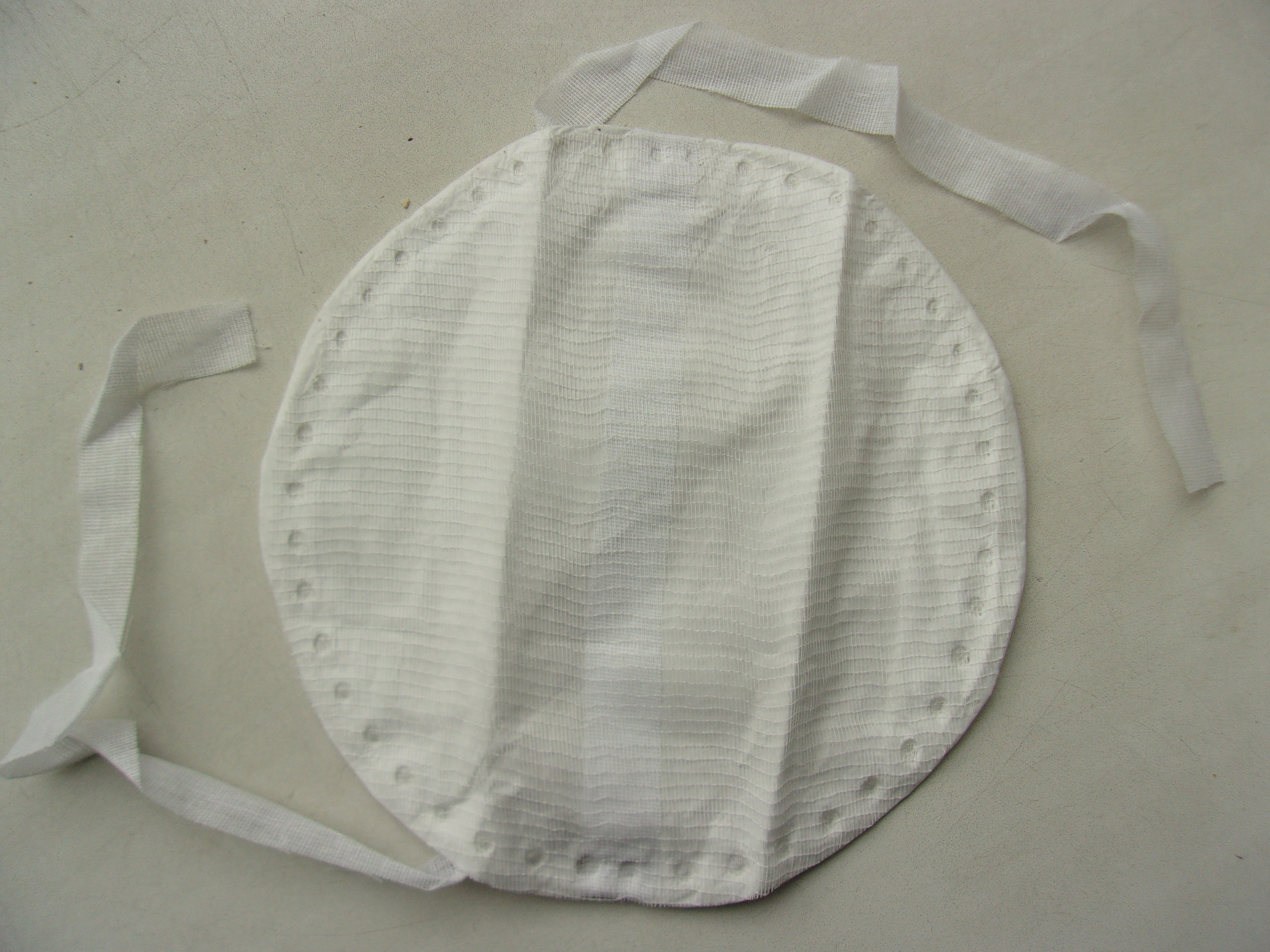 Фильтрующая полумаска Лепесток-200, предназначена для защиты от пыли аэрозолей, производится с небольшими модификациями с 1957г, выпущено более 6 млрд шт. Число 200 в названии означает декларируемую эффективность - изделие якобы снижает концентрацию мелкодисперсной пыли (наиболее плохоулавливаемой) минимум в 200 раз. Это не подтверждается результатами независимых испытаний как в лабораторных, так и в производственных условиях; а применение подобных СИЗОД ограничено научно-обоснованным национальным законодательством в США - не более 10 ПДКрз. См. Респираторы ШБ «Лепесток» . Хотя изделие сертифицировано после принятия ГОСТ 12.4.191, на нём отсутствует маркировка (название модели, класс защиты, изготовитель).